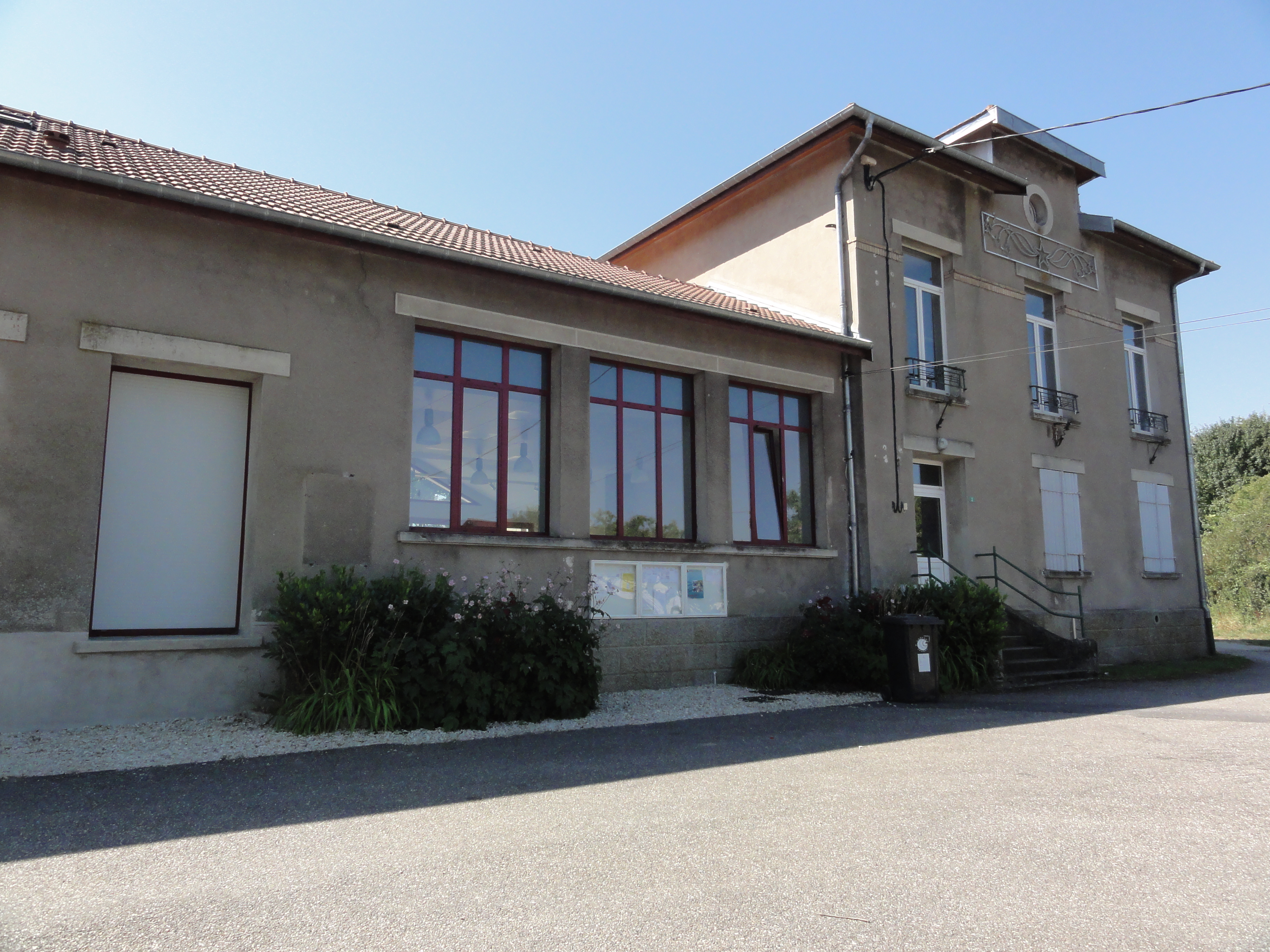 Chattancourt (Meuse) mairie